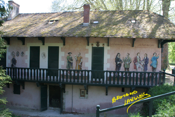 fresque réalisée sur les murs du chalet des chasseurs à Chanceaux-près-Loches